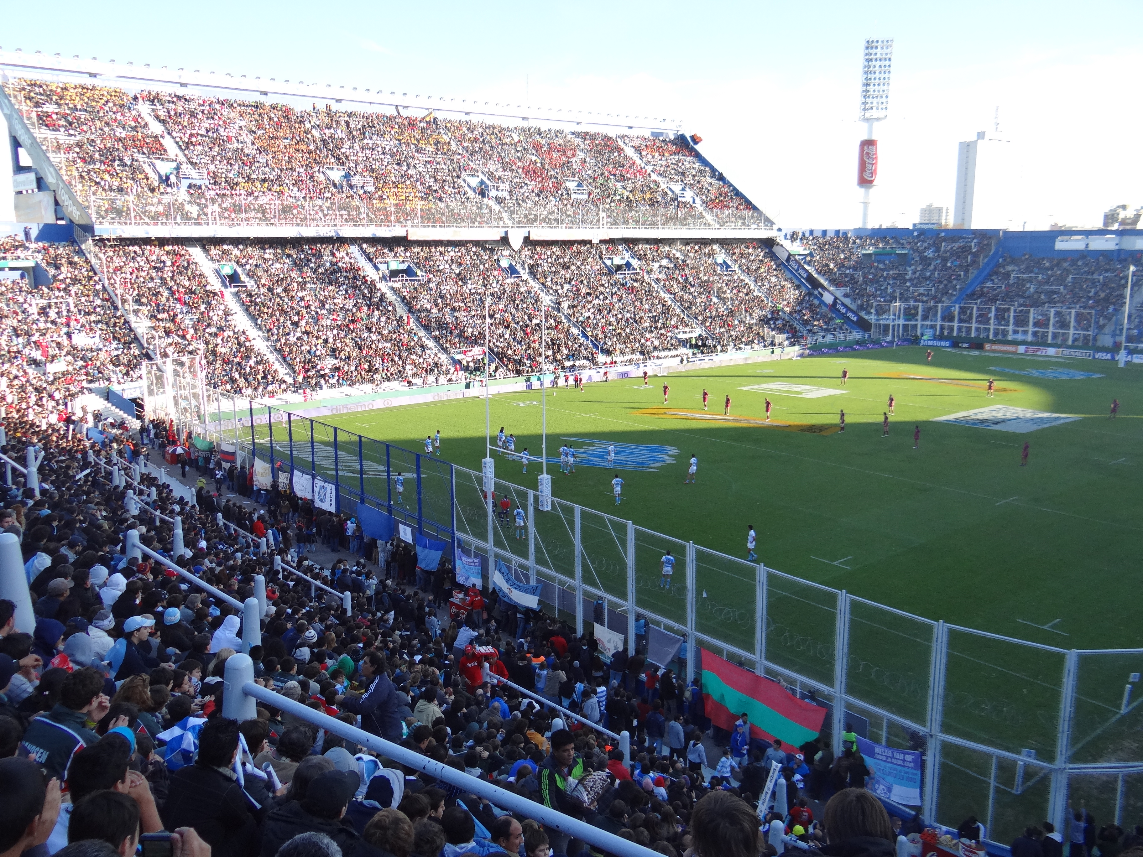 Partido de rugby entre las selecciones "B" de Argentina e Inglaterra, celebrado el 15/06/2013 en el estadio José Amalfitani, Ciudad Autónoma de Buenos Aires, Argentina.